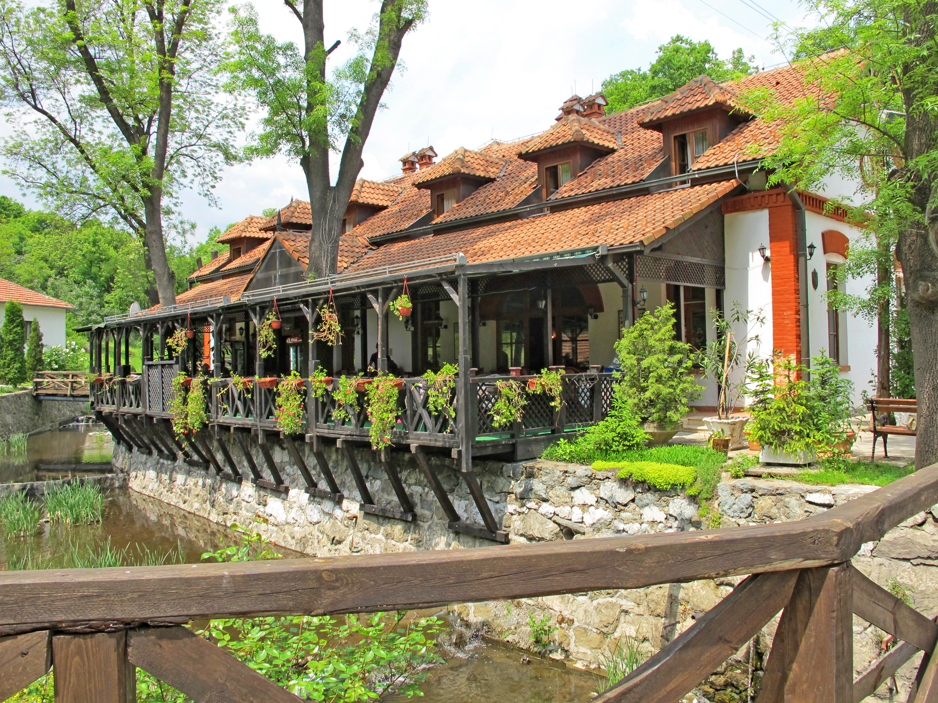 Konak kneza Miloša u Brestovačkoj Banji